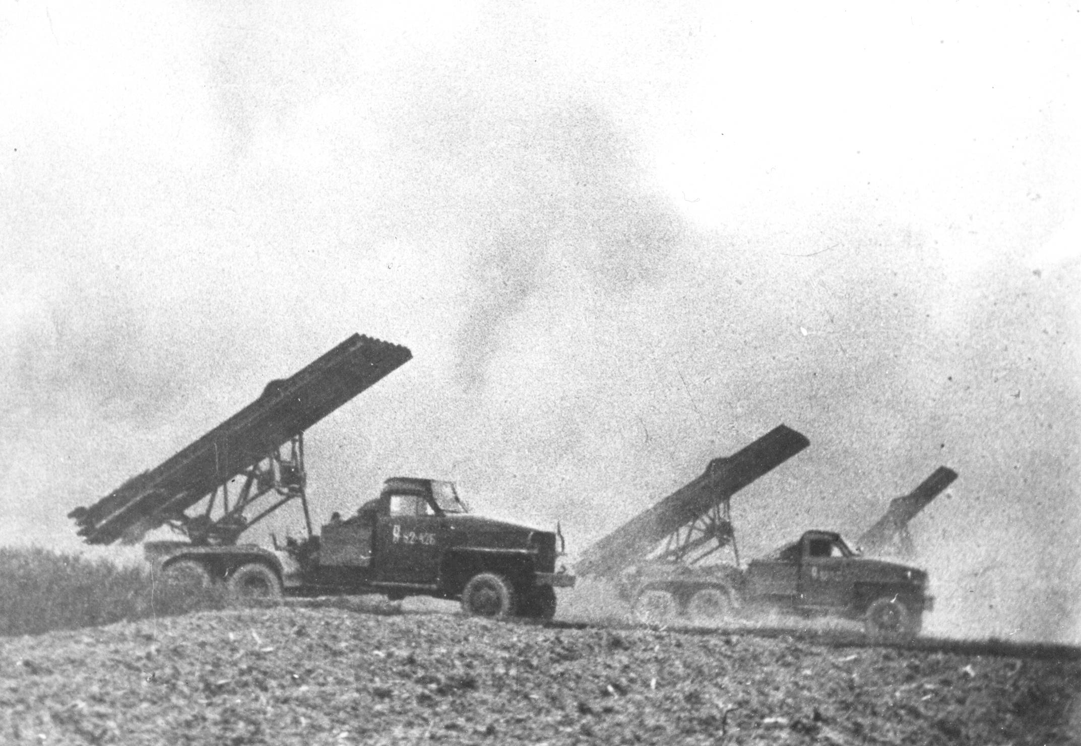 Srpskohrvatski / српскохрватски: Kaćuše dejstvuju tokom Beogradske operacije oktobra 1944.